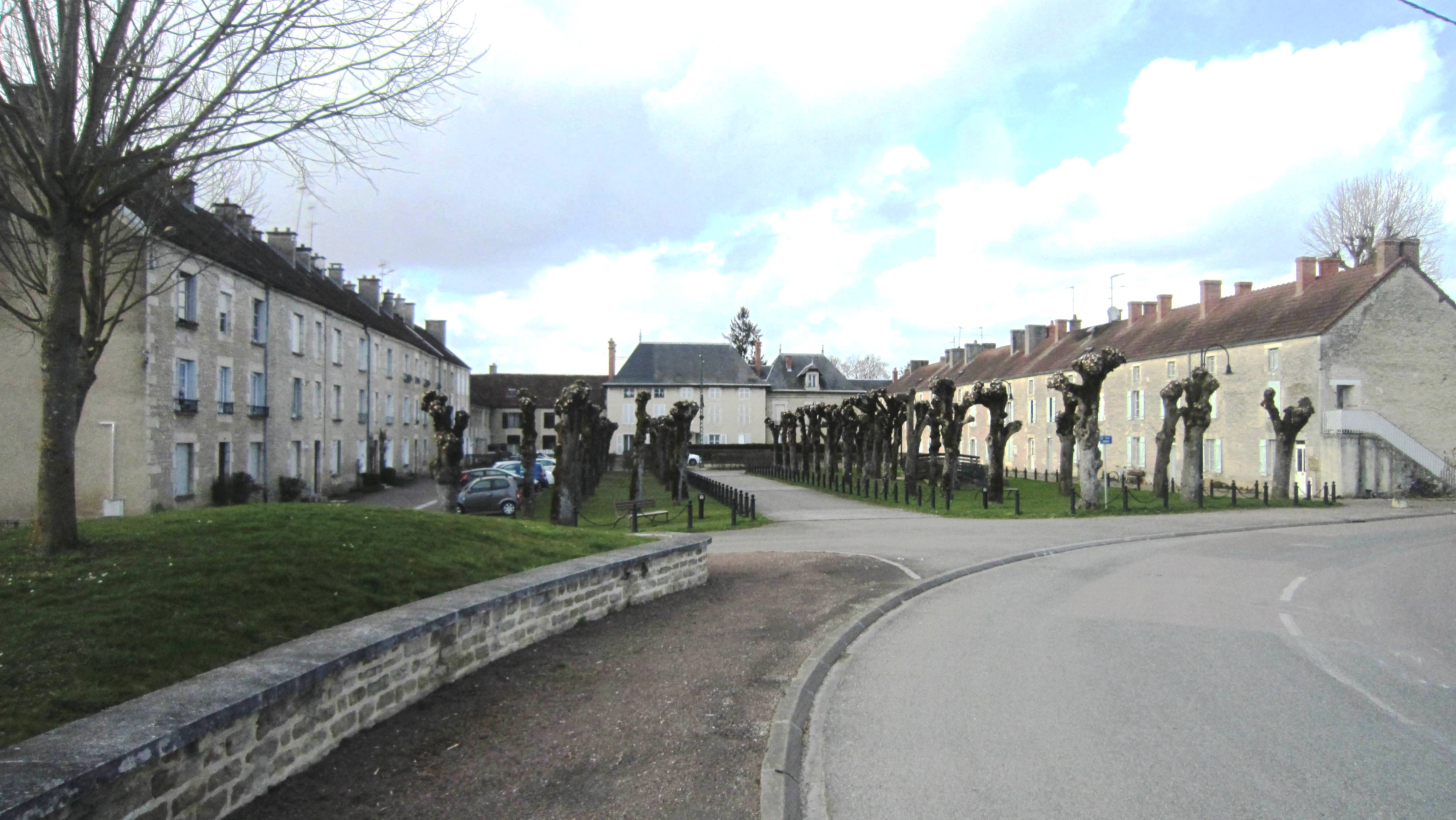 Le cours Marmont à Sainte-Colombe-sur-Seine, exemple de cité ouvrière (XIX° siècle)